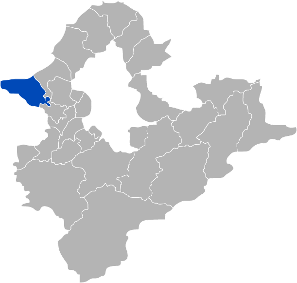 臺灣省臺北縣林口鄉，KaurJmeb於2005年2月7日為編輯臺北縣林口鄉所繪。